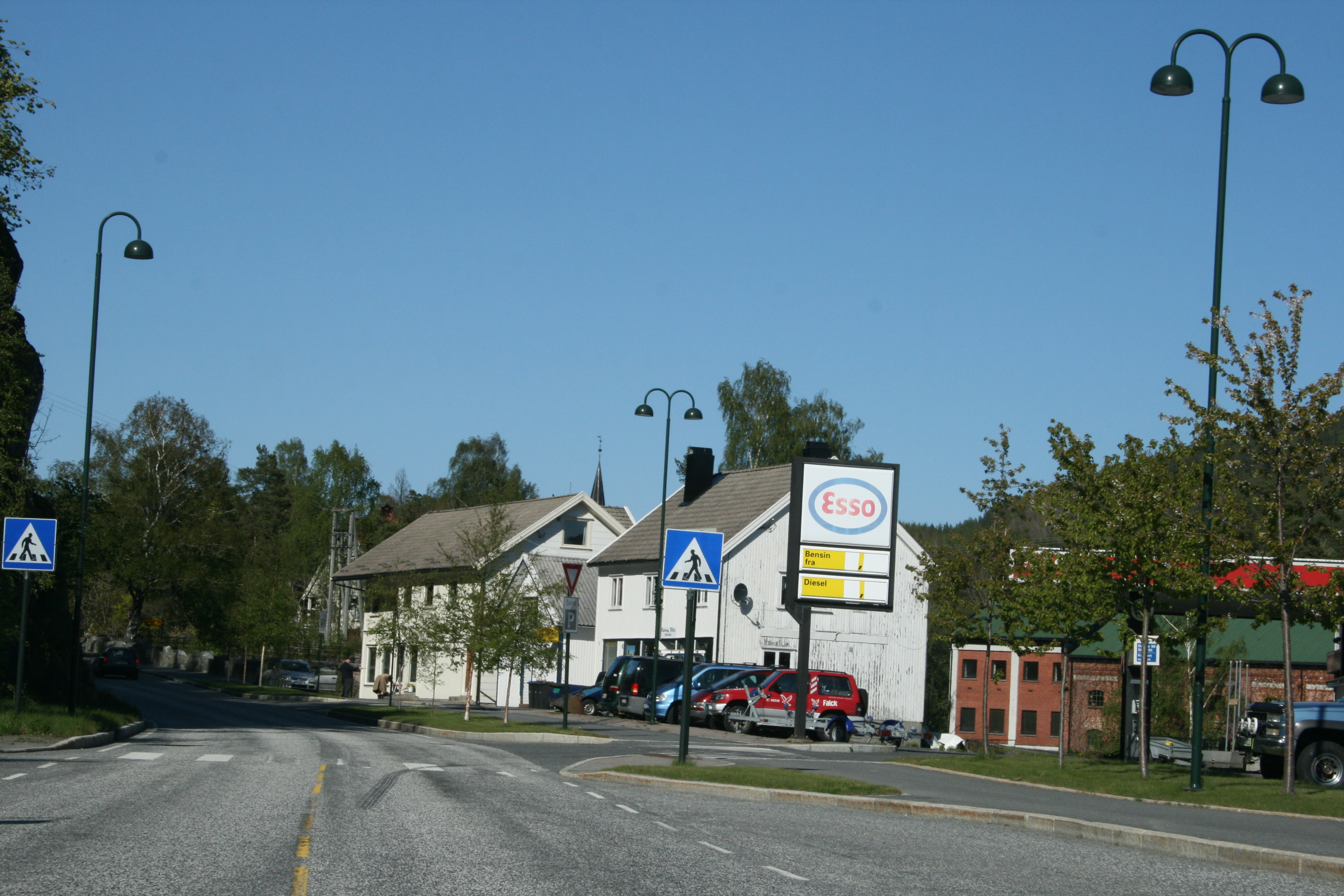 Søndeledtona